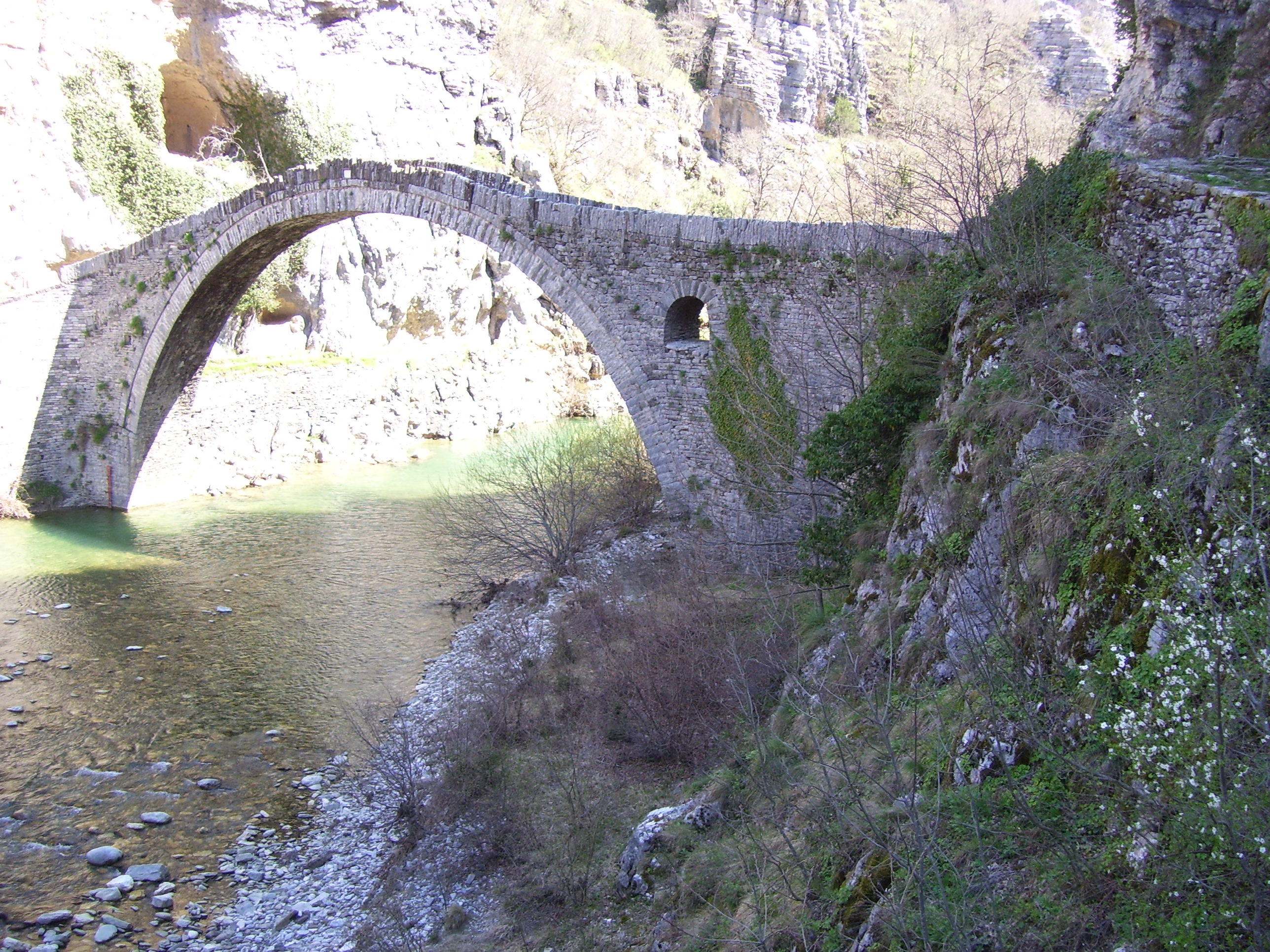 Стар мост в село Дилофо, Загори, Гърция.